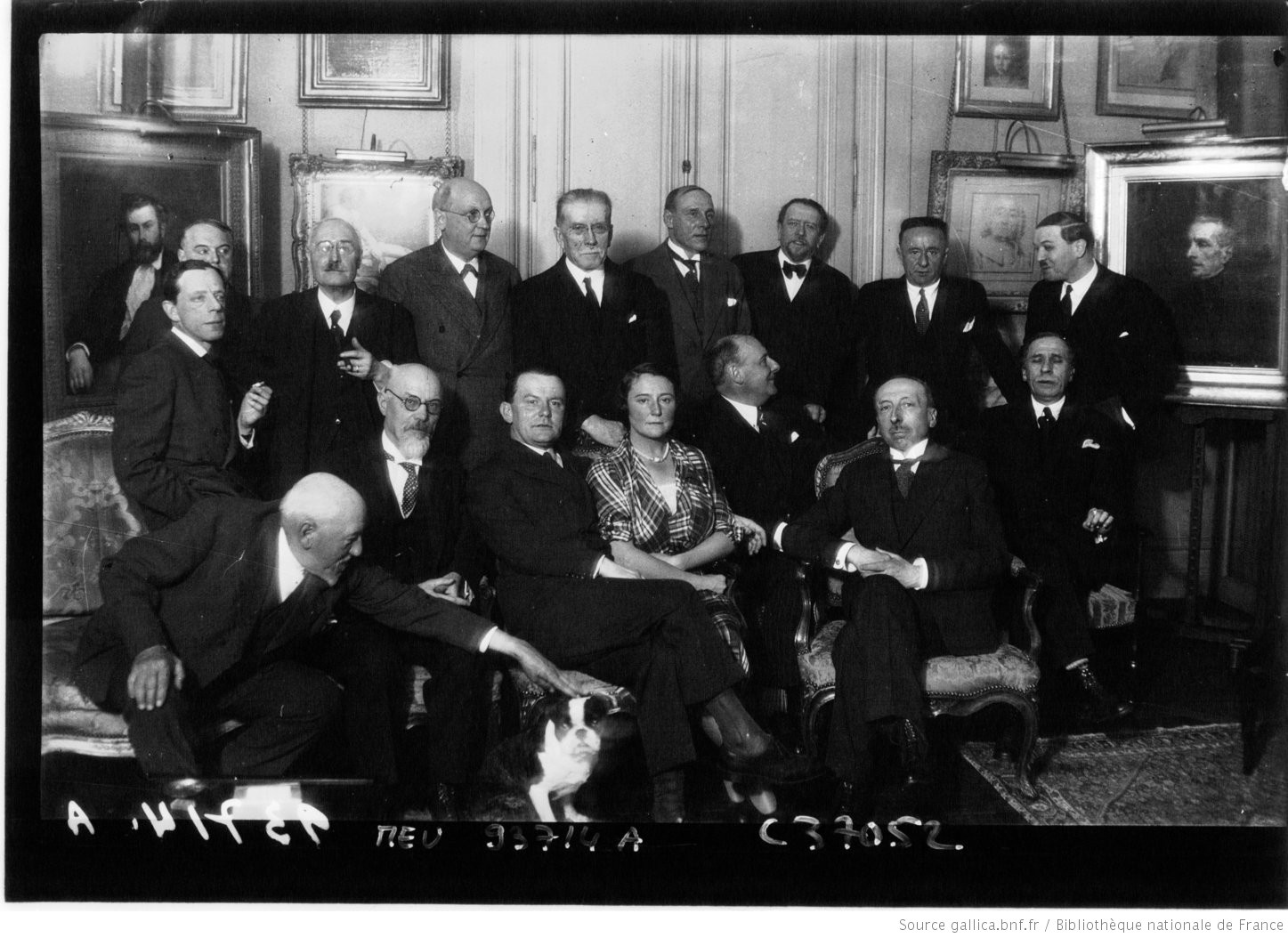 Les membres du jury du Prix de La Renaissance à Paris en 1932. Photographie de presse de l'Agence Meurisse.